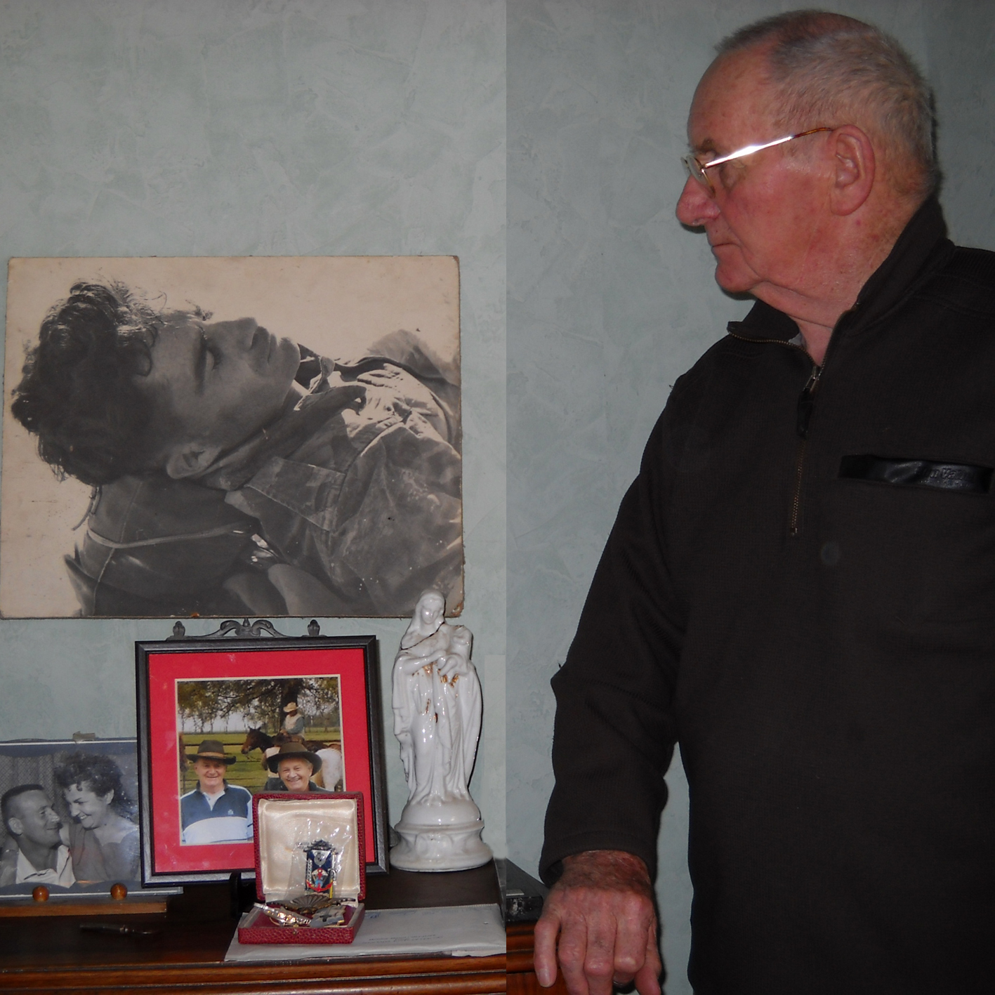 Le lt-colonel (er) Martial Chevalier, secrétaire particulier du général Marcel Bigeard au 6e BPC en Indochine, puis au 3e RPC en Algérie, regarde la photo du sergent-chef René Sentenac blessé mortellement à Timimoun le 22 novembre 1957, photo prise par le photographe du régiment, Marc Flament, peu de temps avant son décès (photo (c) 2011 Didier de Trarieux-Lumière - LumièreBro Productions).